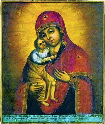 Дубенская Красногорская икона Божией Матери. 1864 г. (ц. Покрова Богородицы Красногорского мон-ря)